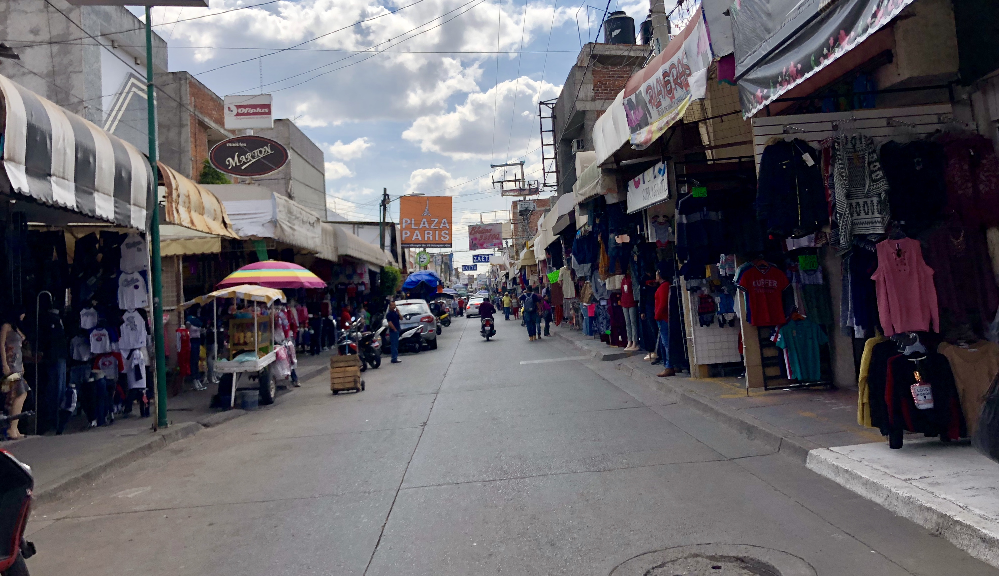 Zona Comercial Textil Uriangato en la Av. Álvaro Obregón, imagen que muestra los puestos de ropa de Uriangato.